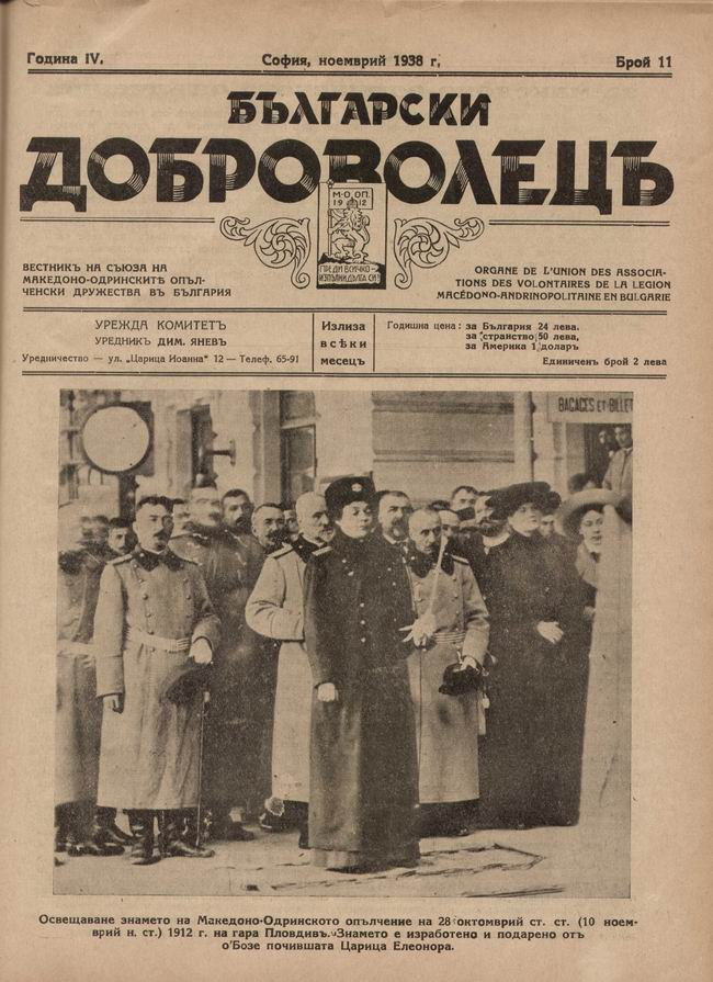 Брой на Български доброволец.